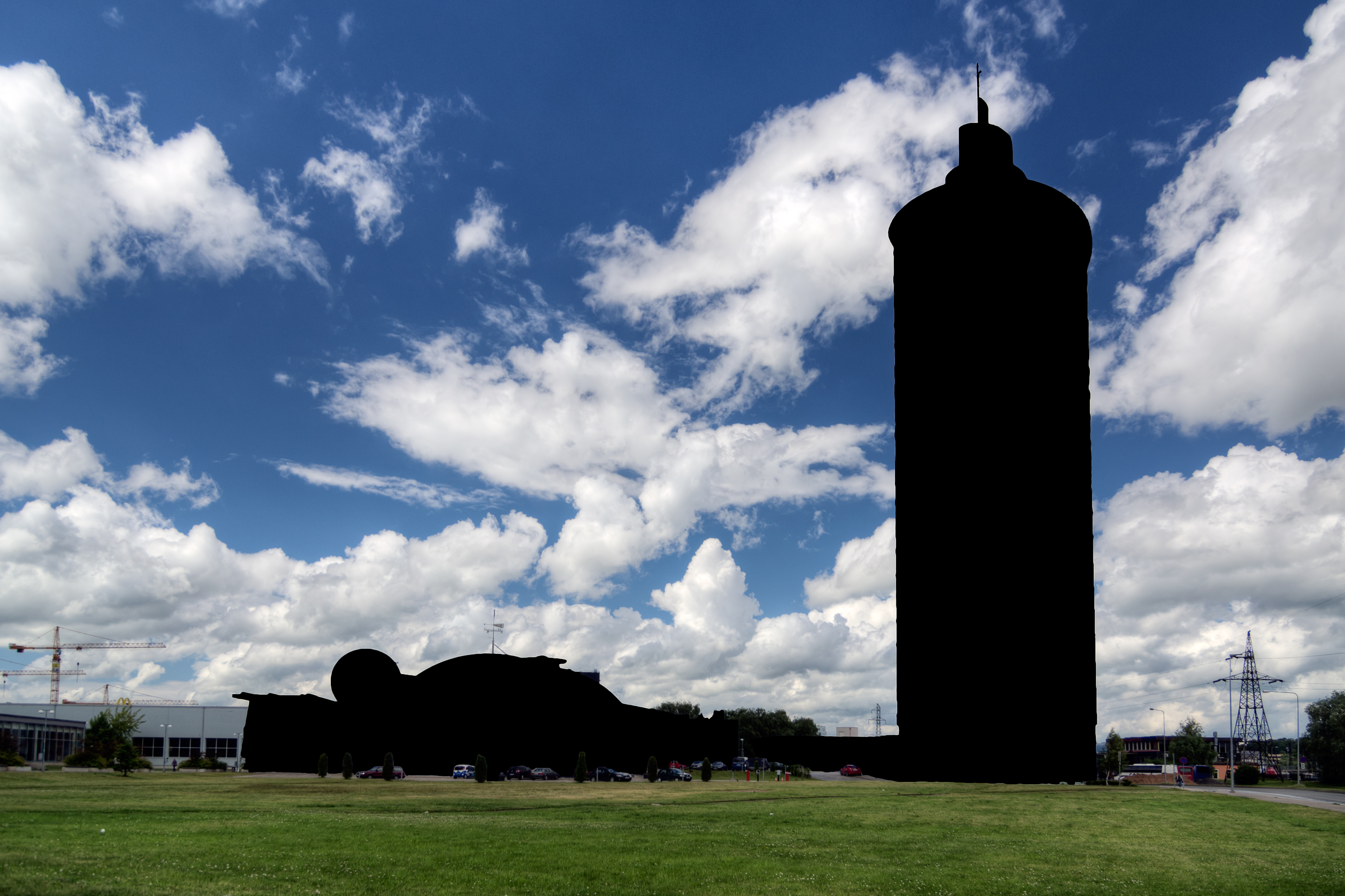 Tigutorn ja AHHAA keskus kaetud mustaga. Arhitektid Ain Padrik ja Vilen Künnapu